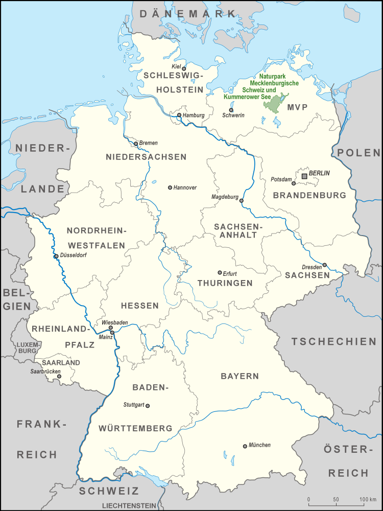 Karte des Naturparks Mecklenburgische Schweiz und Kummerower See in Deutschland